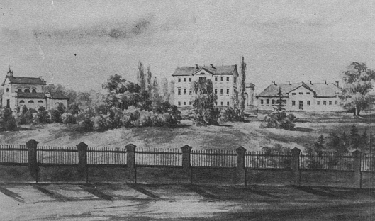 Резиденція Санґушків у Славуті.